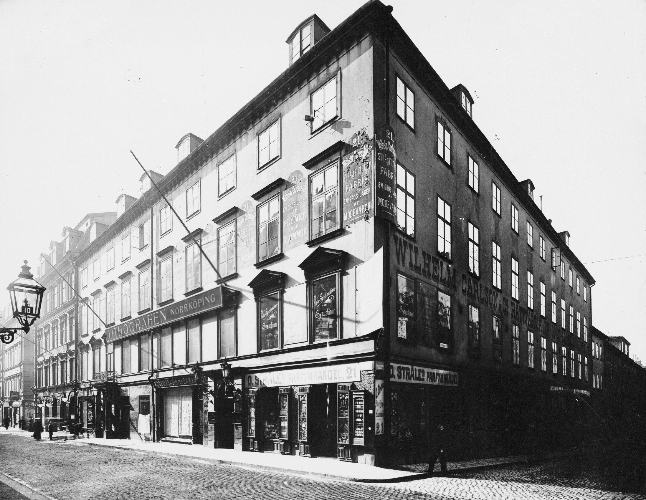 Drottninggatan 19-21, kv Björnen, byggår 1800, arkitekt Gustaf Pfeffer